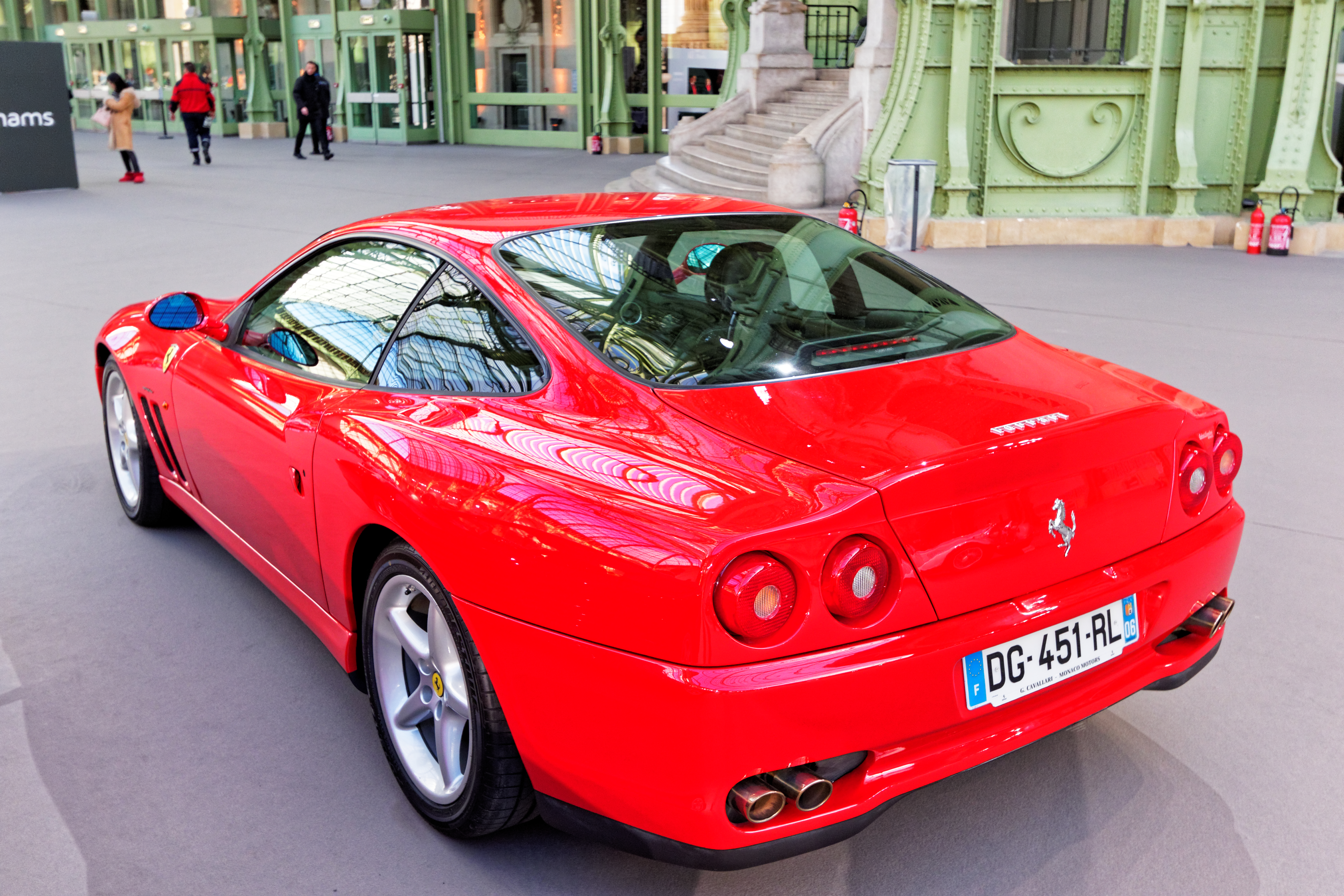 Un des véhicules présenté lors de la vente aux enchères Bonhams 2016 au Grand Palais de Paris.